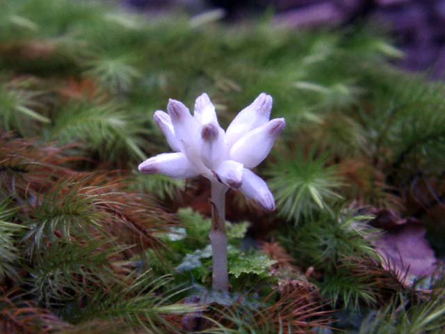 ヒナノシャクジョウ / Burmannia championii